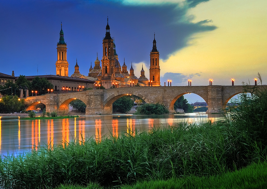 Basílica del Pilar - Río Ebro, Zaragoza. (Spain, 2008 )